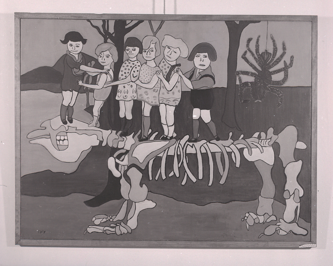 Località non identificata. Galleria d'arte? Interni. Ritratto dell'artista Coplay insieme ad altre persone. Coplay, Dipinti,s.d. Servizio fotografico : Italia, 1960 / Paolo Monti. - Buste: 15, Fototipi: 19 : Negativo b/n, gelatina bromuro d'argento/ pellicola ; 6x6. - ((Serie costituita da 15 buste di negativi identificati con i nn.: 14566, 14567, 14568, 14569, 14570, 14571, 14572, 14573, 14574, 14575, 14576, 14577, 14578, 14579, 14580, 14581, 14582, 14583, 14584, e tenute insieme con da una graffetta. - Sulla busta identificata con la numerazione 14566/67 iscrizione didascalica manoscritta a pennarello: "Coplay". - Le buste identificate con le numerazioni 14566/67, 14581/84 contengono ciascuna più negativi non identificabili singolarmente.